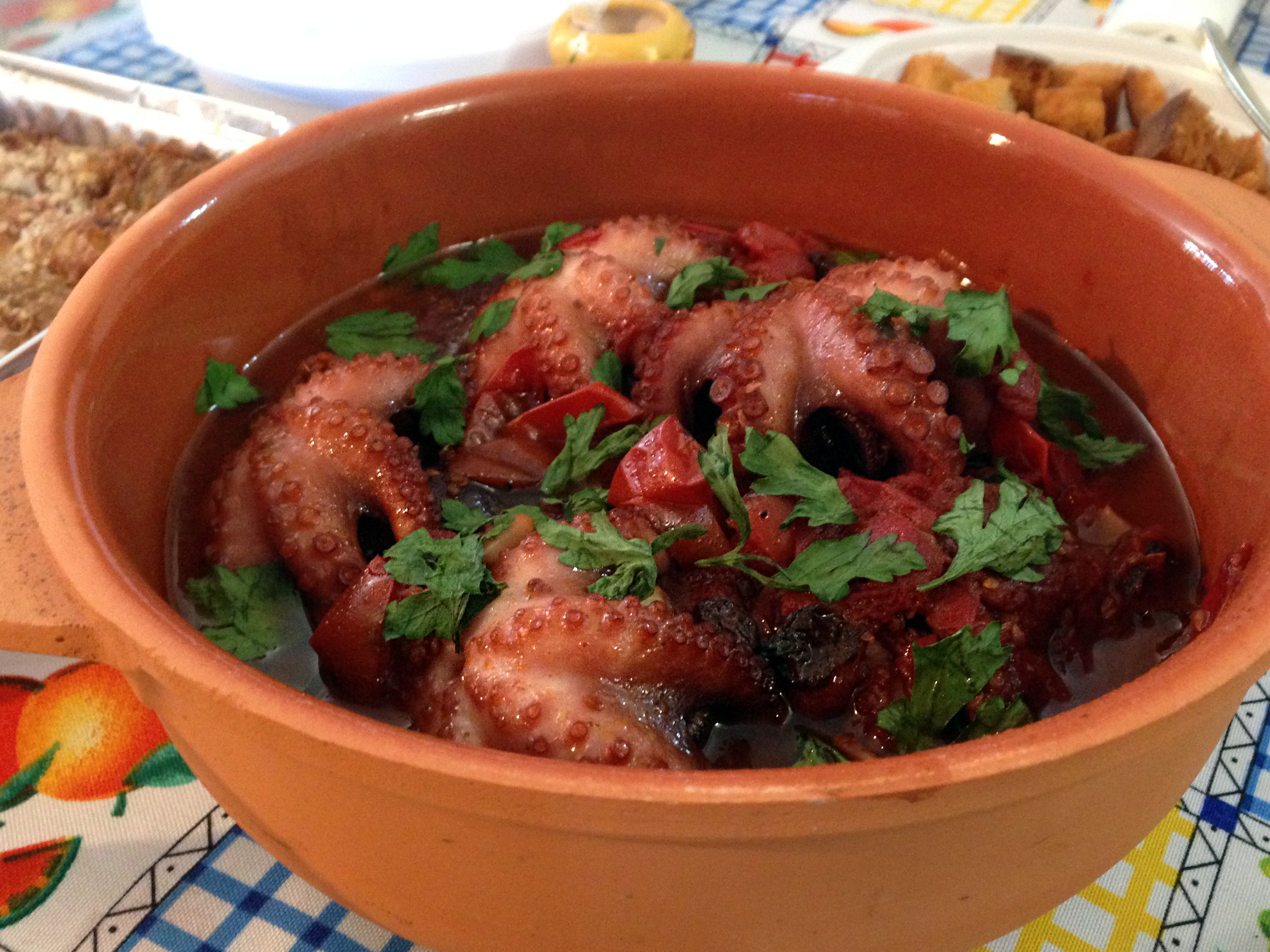 Polipi alla Luciana in casseruola